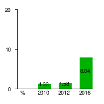 Діаграма результатів ĽSNS на словацьких виборах